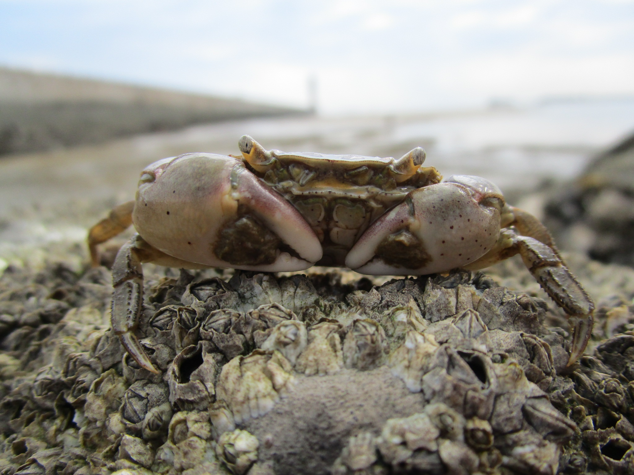 Hemigrapsus takanoi mâle à Dunkerque en juin 2020